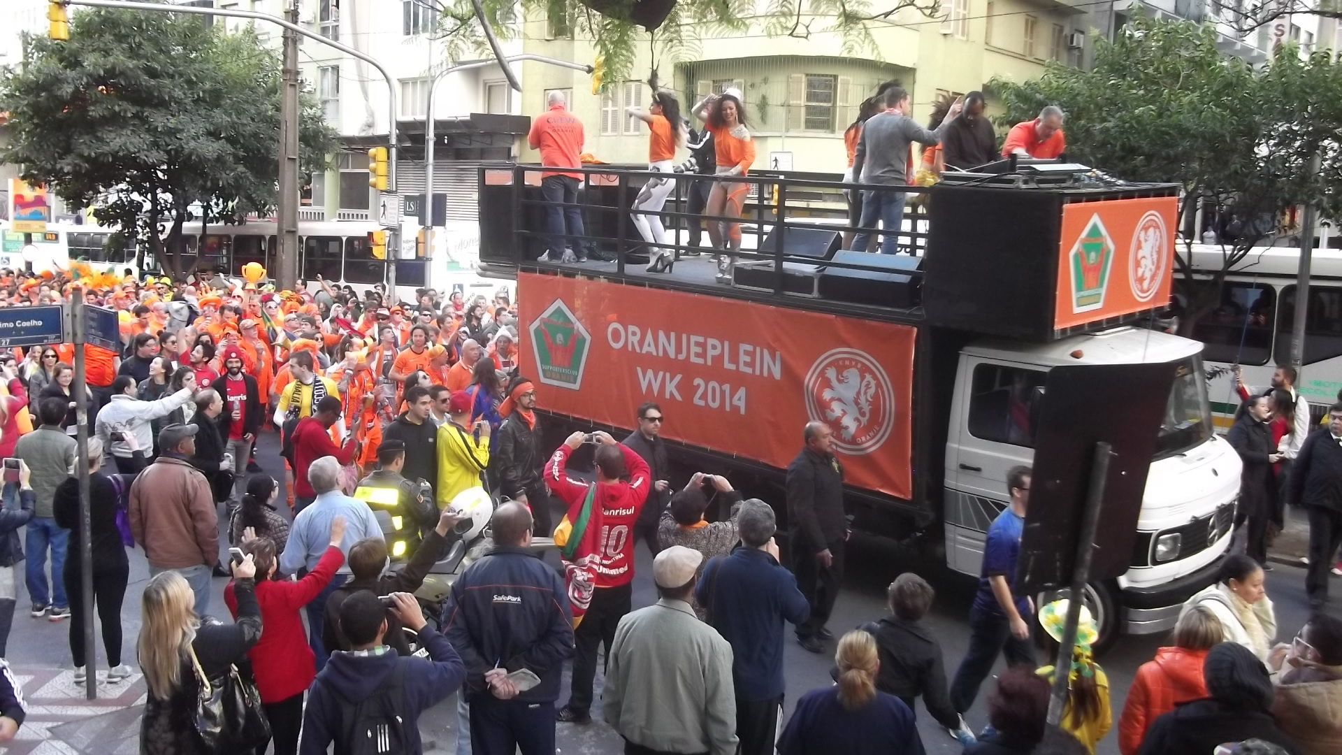 Copa FIFA 2014 - Torcedores dos Países Baixos em Porto Alegre - 2014-06-18